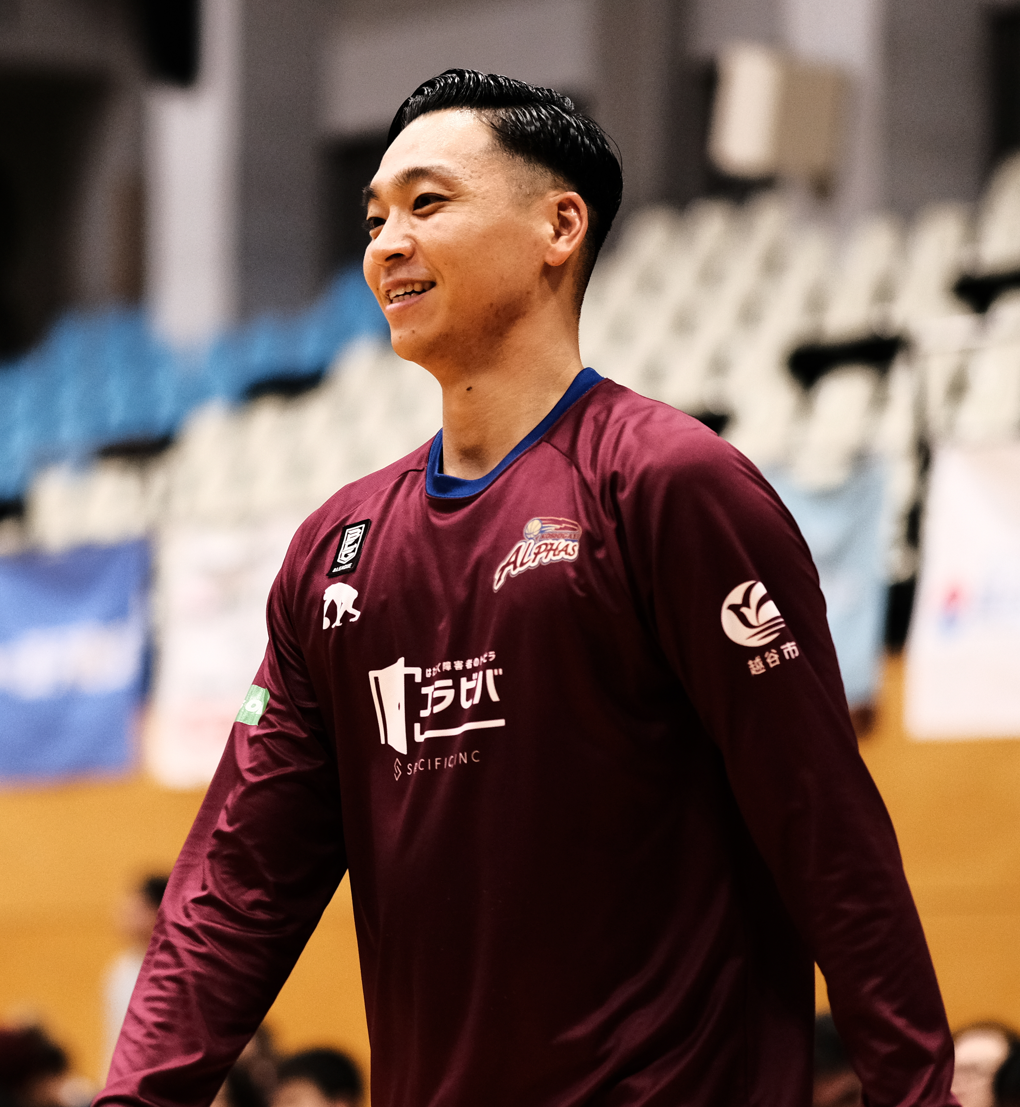 20191123 11月23日 越谷アルファーズ vs ライジングゼファー福岡